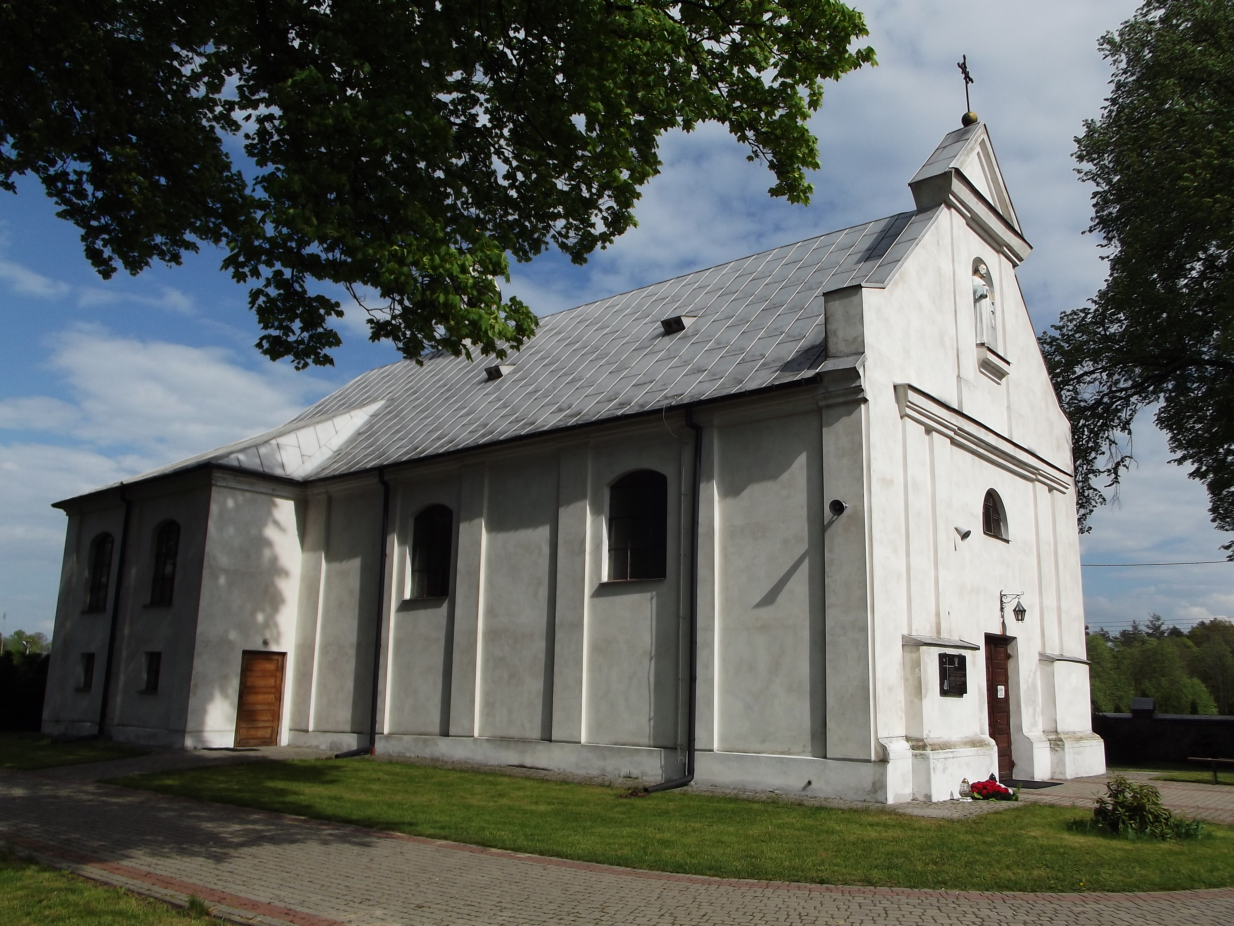 Kościół św. Piotra i Pawła w Wierzbnie